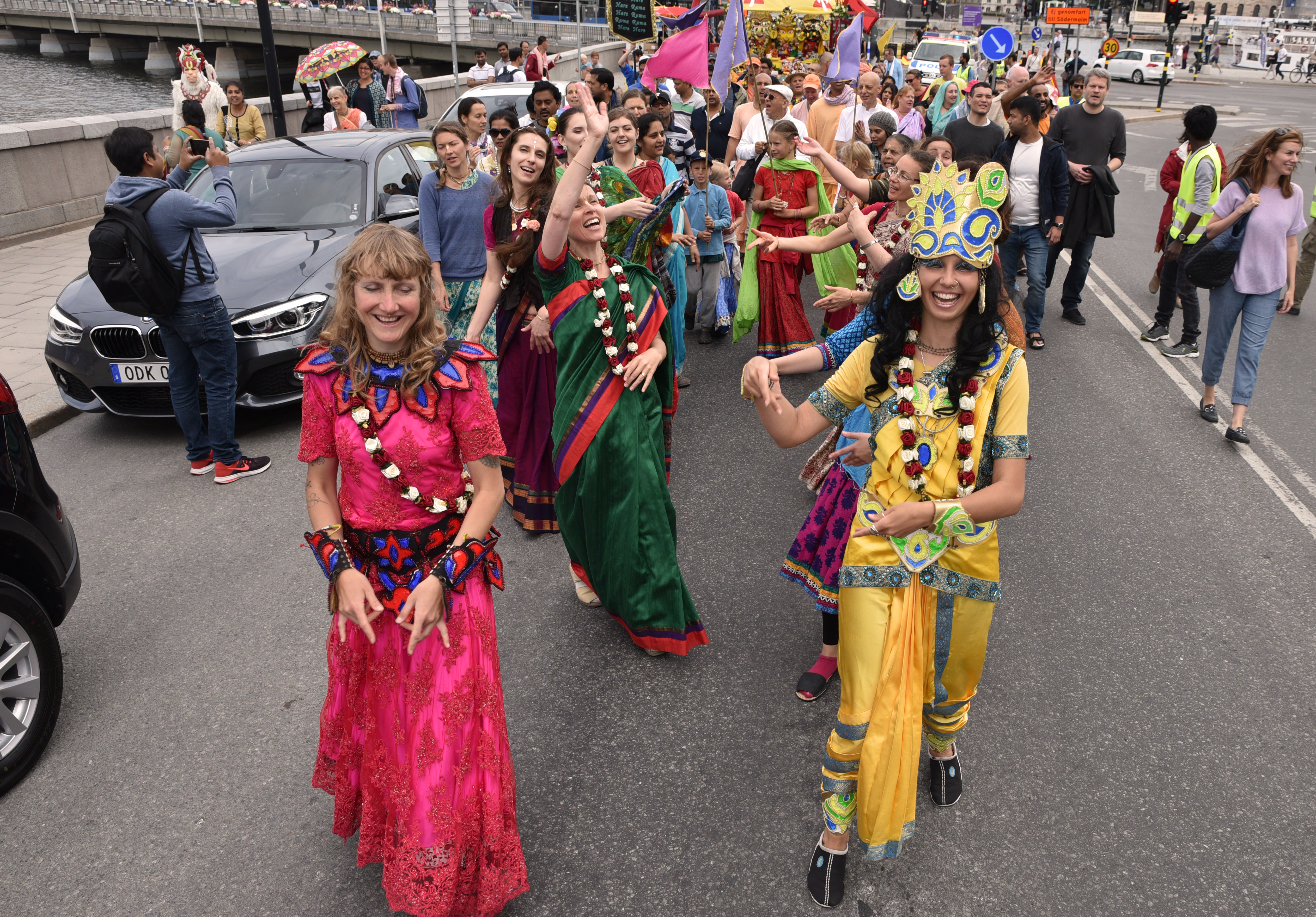 ISKCON Stockholm firar den Indiska vagnfestivalen Ratha Yatra 2017.